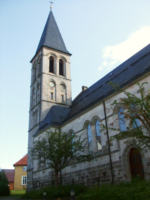 Pfarrkirche St. Leonhard, Stödtlen, Ostalbkreis, Architekt: Joseph Cades (1894)